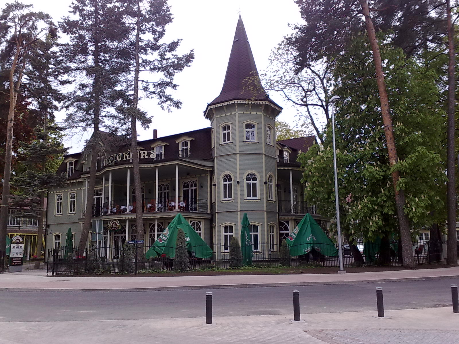 Turaidas un Jūras ielu krustojums